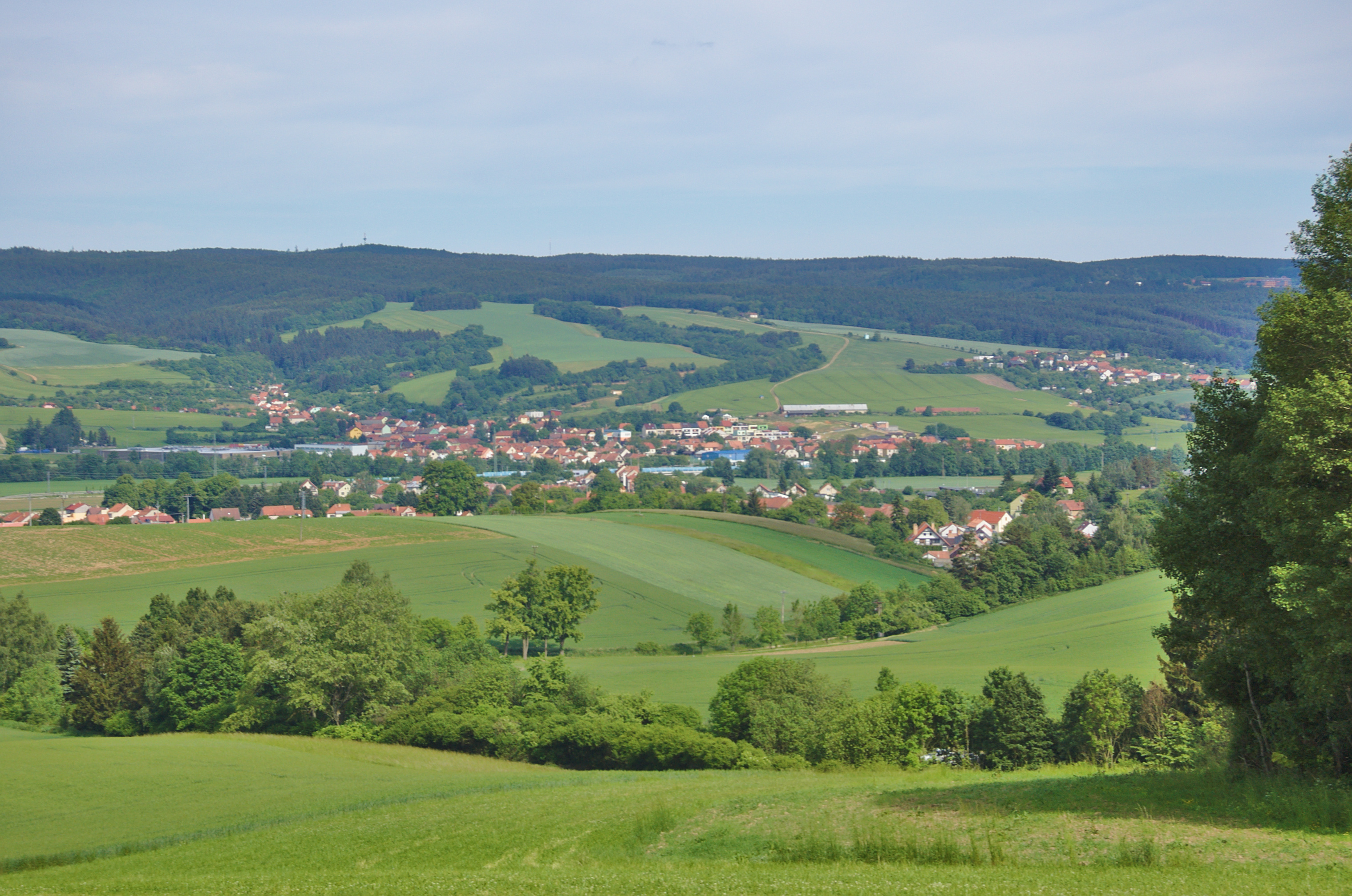 Pohled na Ráječko od západu, okres Blansko